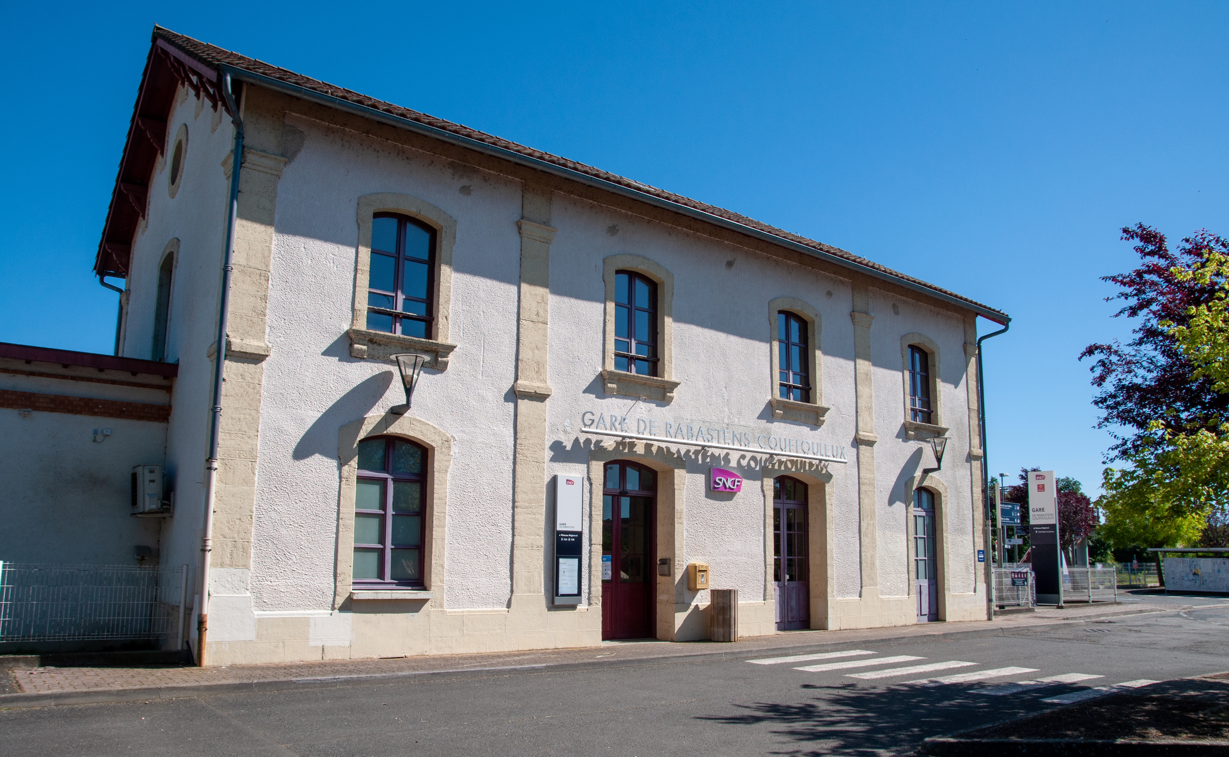 Gare de Rabastens Couffouleux